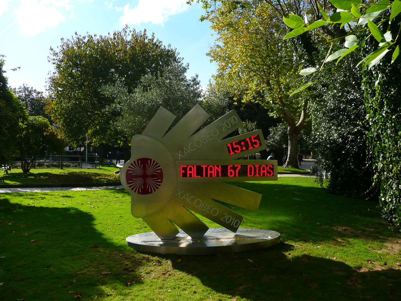 Contador Xacobeo 2010, Santiago de Compostela